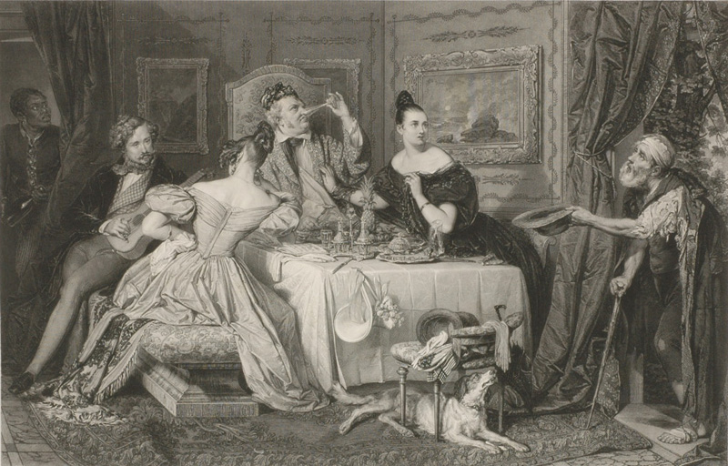 The Debauchee